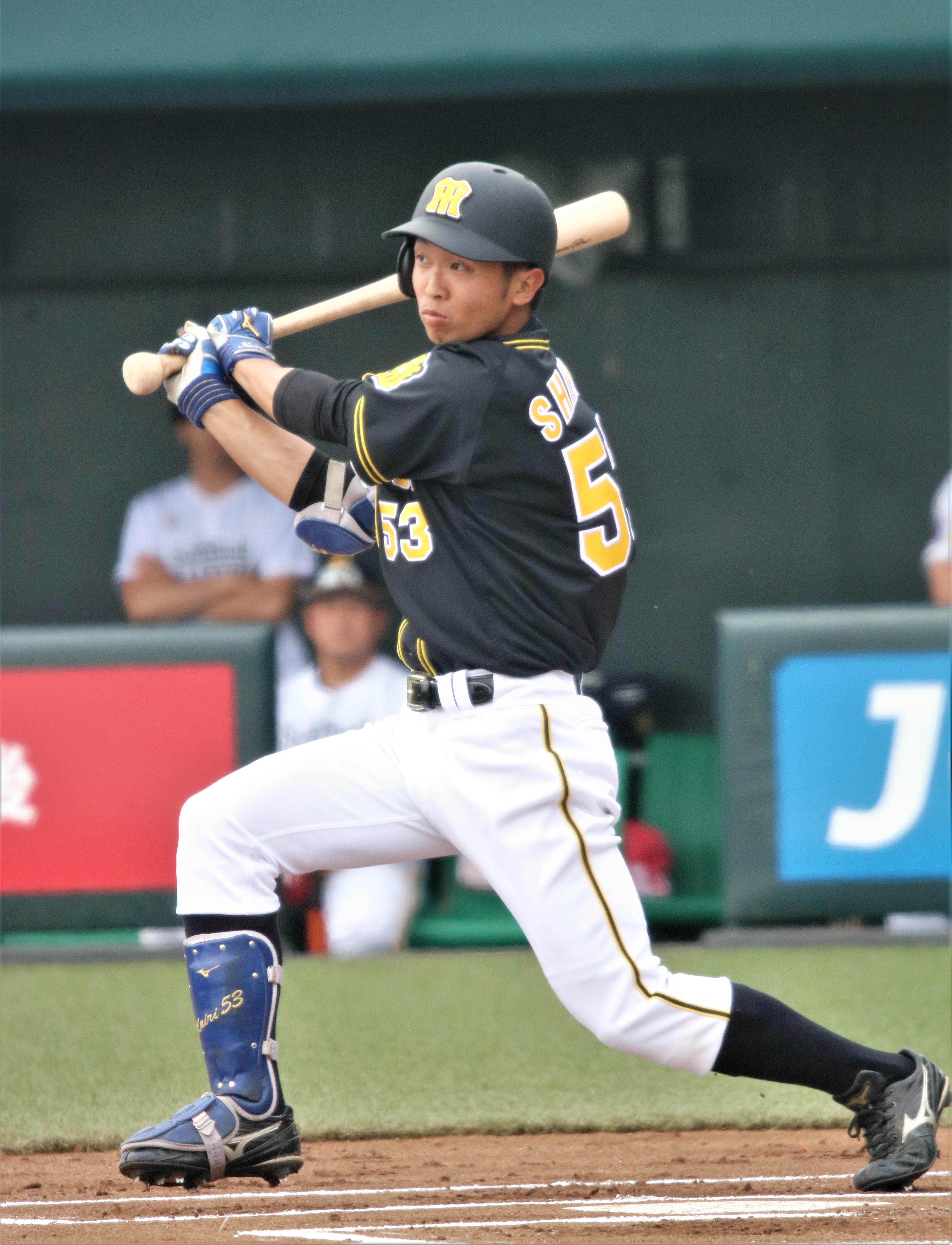 2018/5/1 タマホームスタジアム筑後